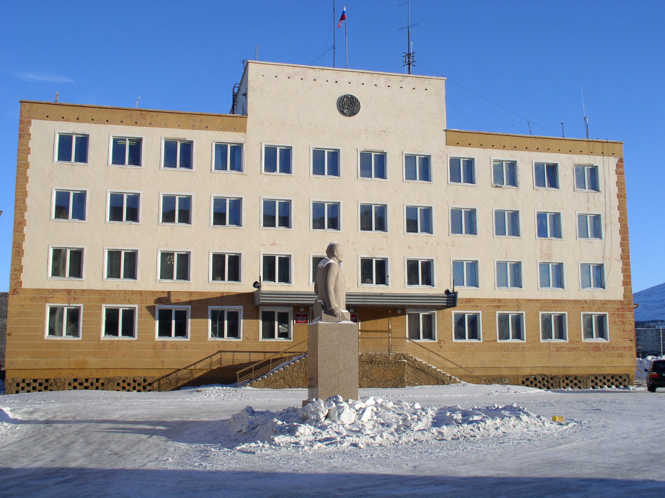 Чаунская администрация